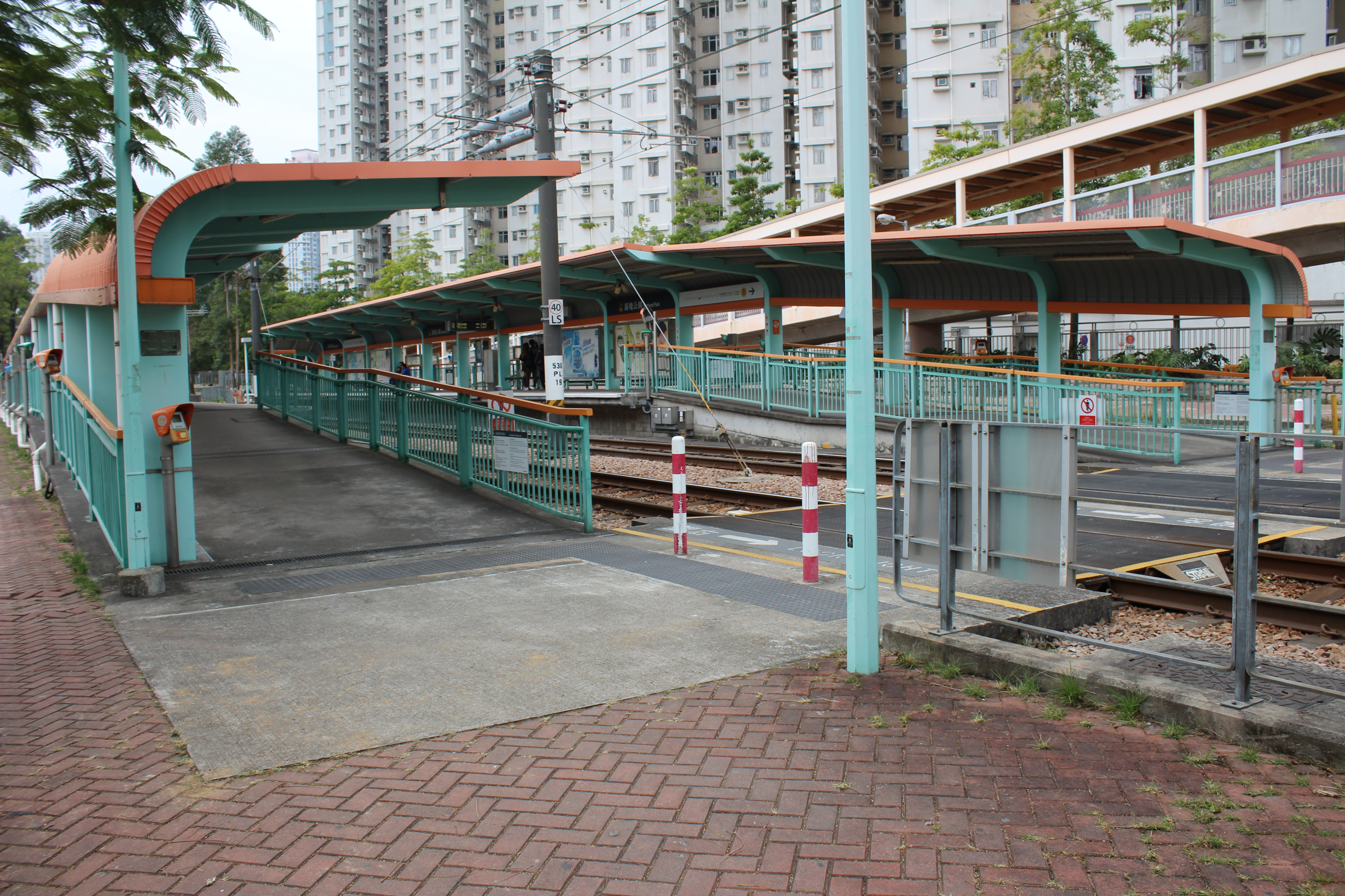 濕地公園站月台